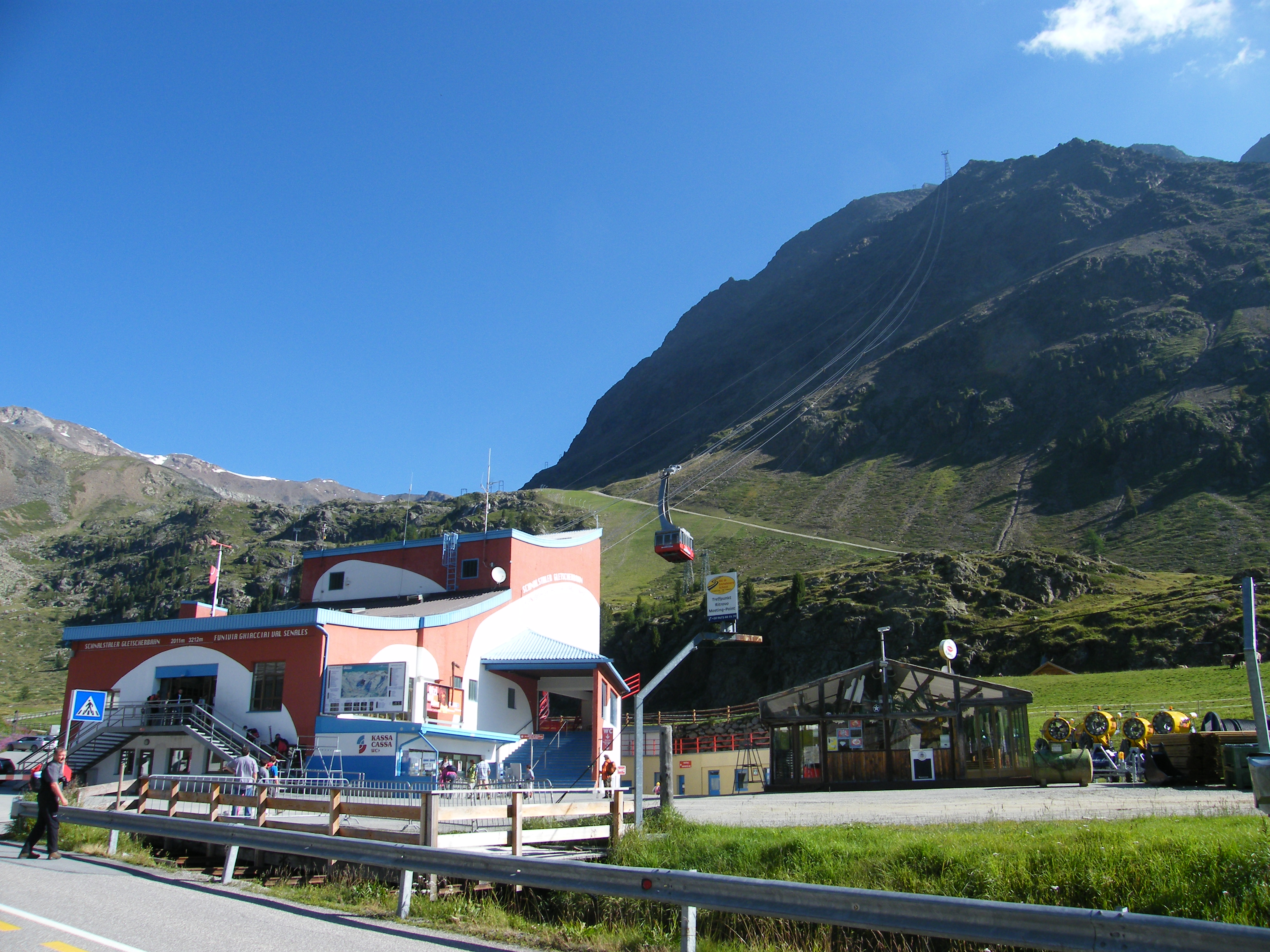 Talstation Schnalstaler Gletscherbahn